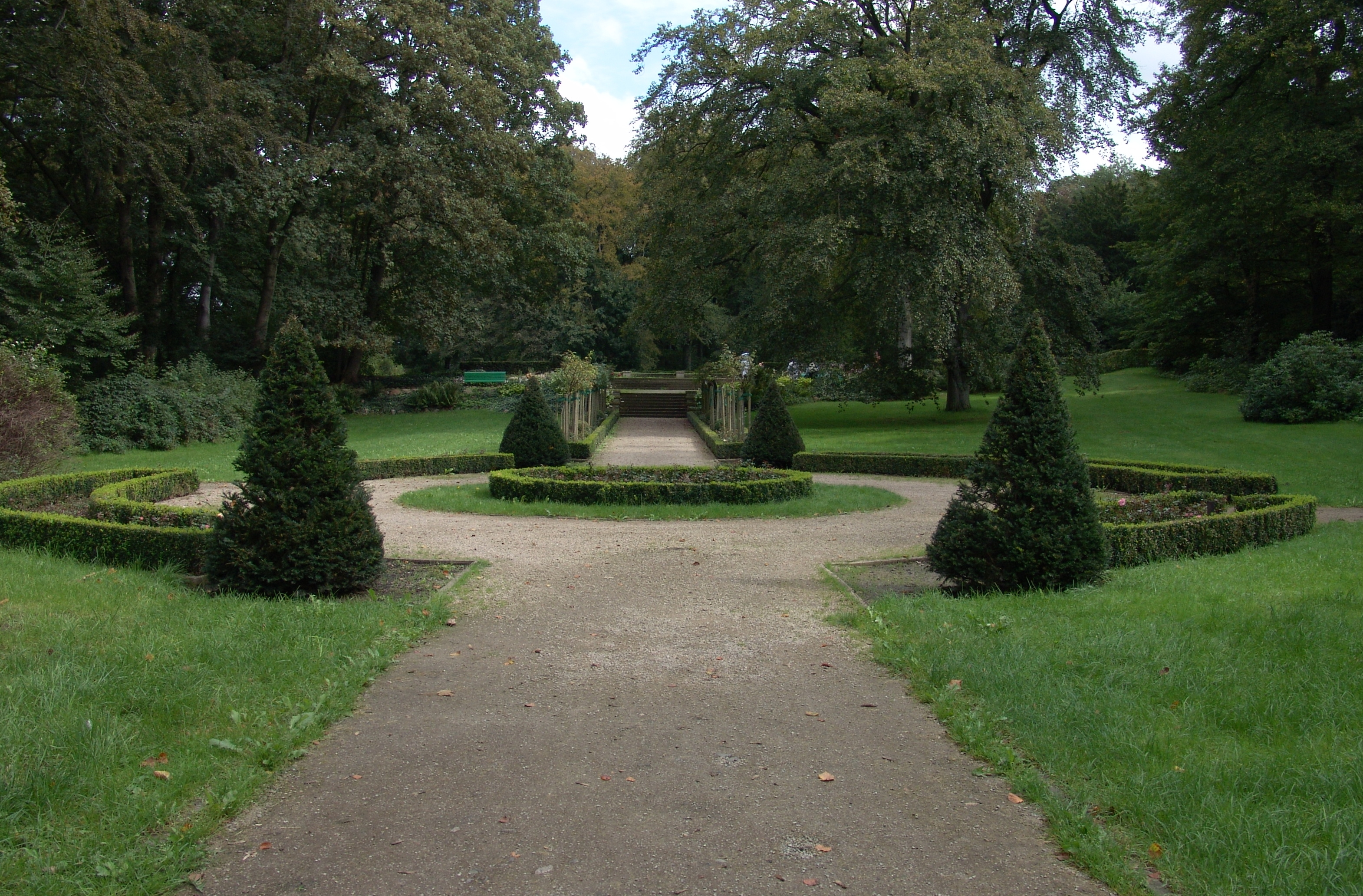 Wätjens Landgut, „Roselius-Garten“.Die Gesamtanlage ist ein geschütztes Kulturdenkmal in der Freien Hansestadt Bremen, mit der Nr. 1762 beim Landesamt für Denkmalpflege registriert.